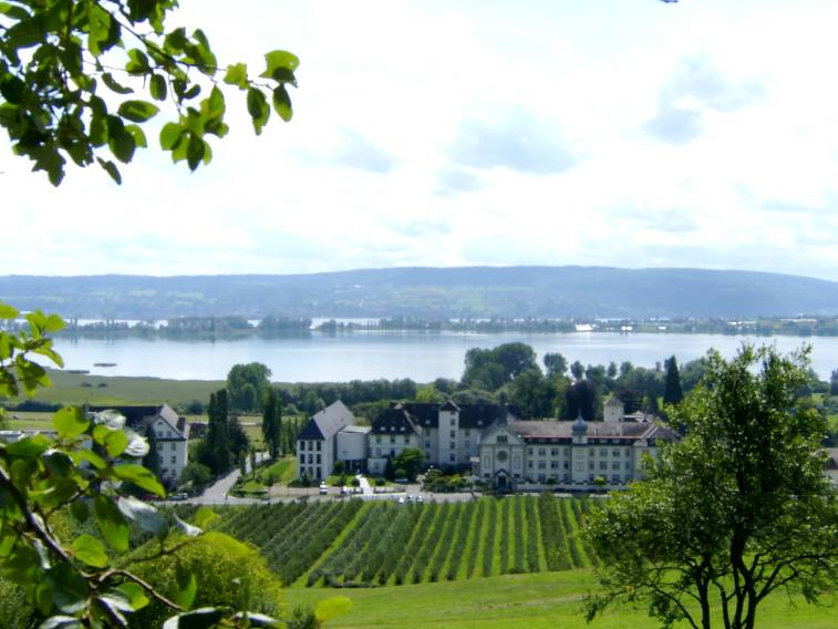 Blick vom Norden auf Kloster Hegne; Foto: tungsten 2004, Lizenz: GNU-FDL